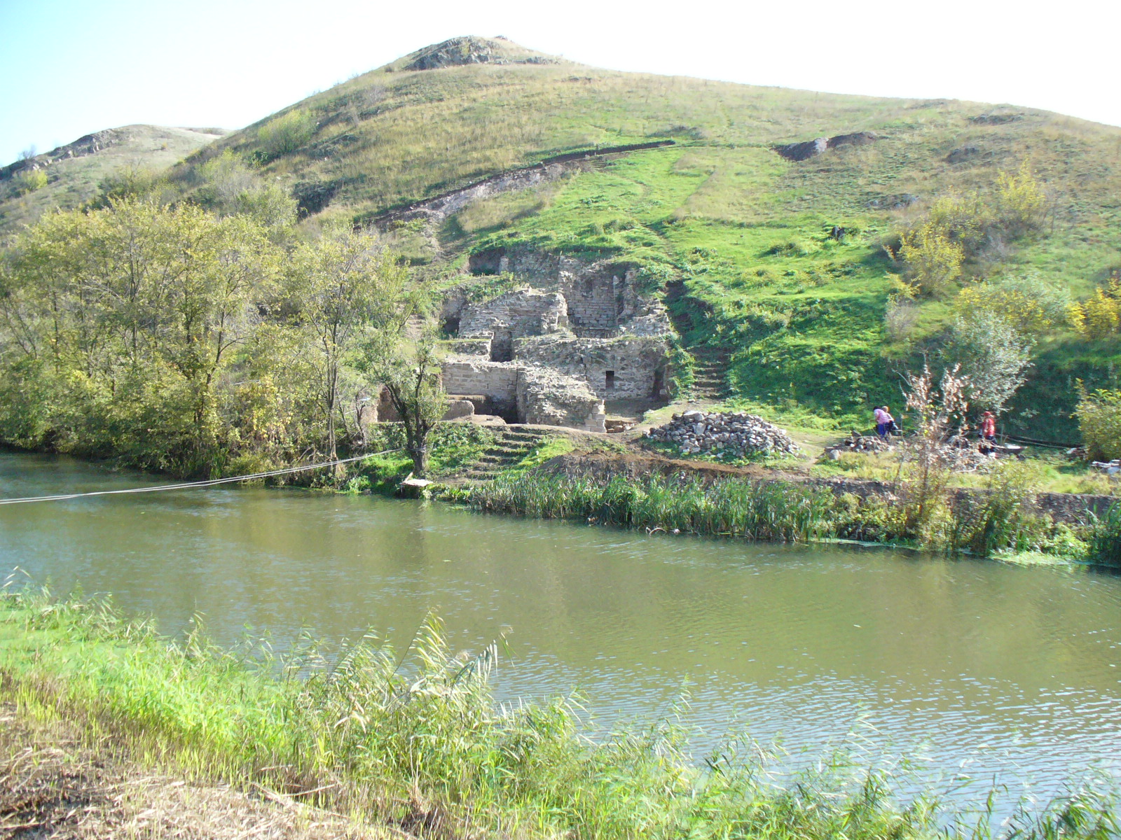 Водоотбранителната кула на левия бряг на р.Мочурица. Снимката е на Исторически музий Карнобат -2006г.